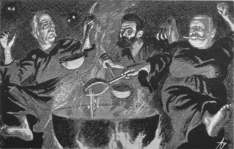 Karikatur av Andreas Bloch fra "Korsaren" 1905. Fra venstre: Otto Blehr, Alfred Eriksen og Johan Castberg.